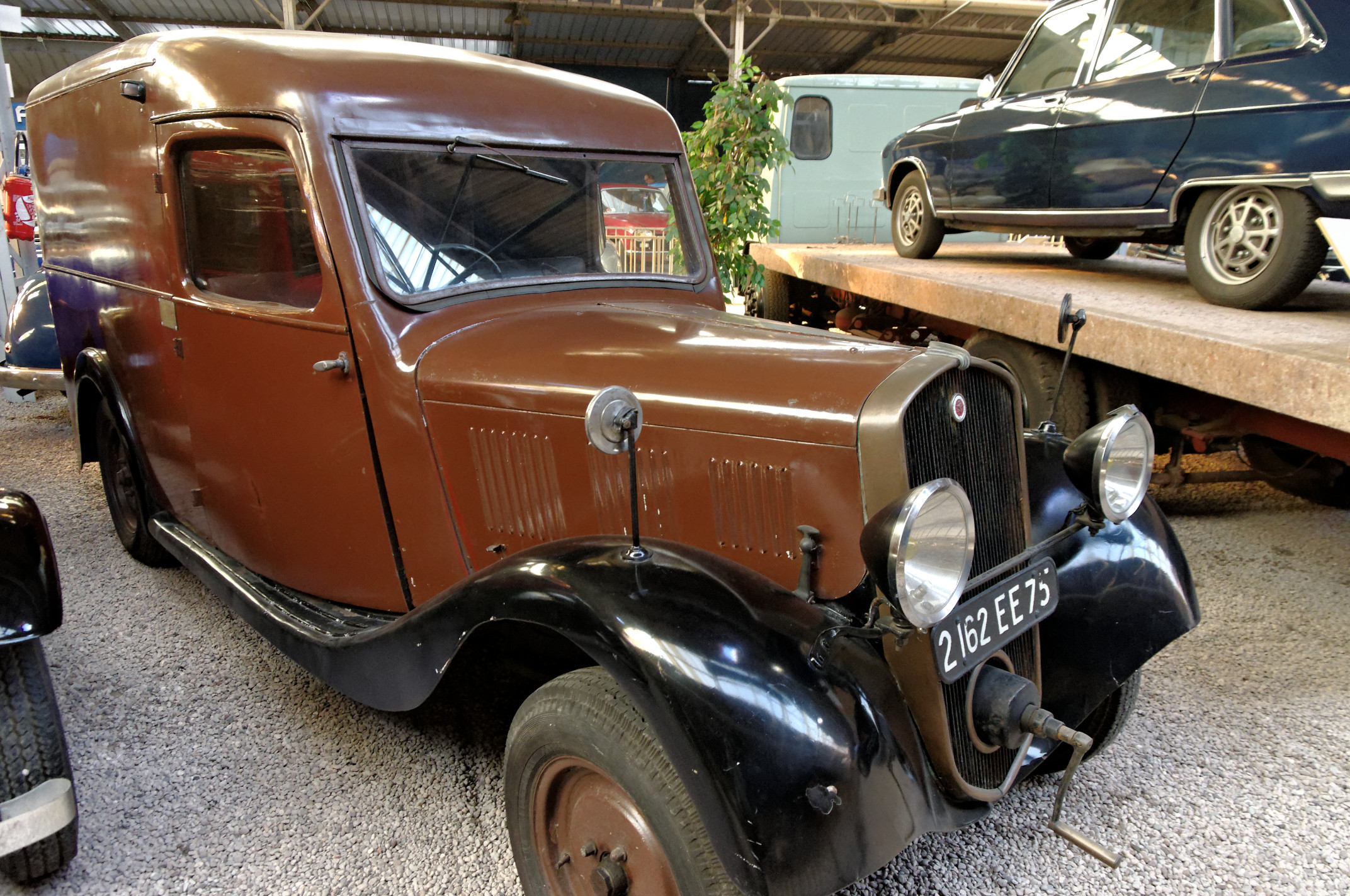 La Licorne 415 (1938), Fourgonnette, 4 cyl. en ligne, 1450 cm3, 34 ch., vitesse max. 70 km/h (Musée Automobile Reims Champagne, Reims, Marne, France)